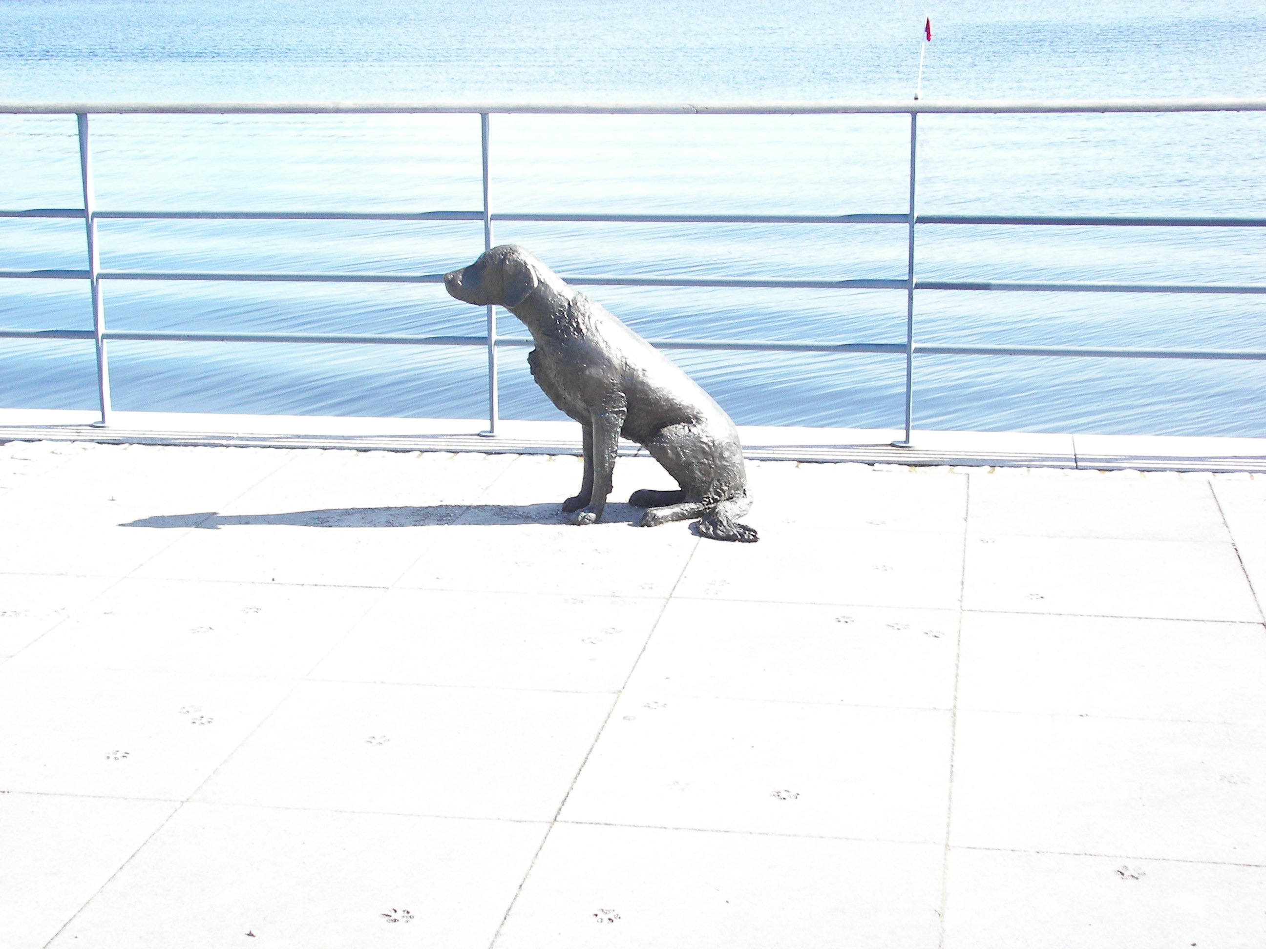 Konstverket Spår som ingår i den konstnärliga gestaltningen Skeenden av Linnéa Jörpeland